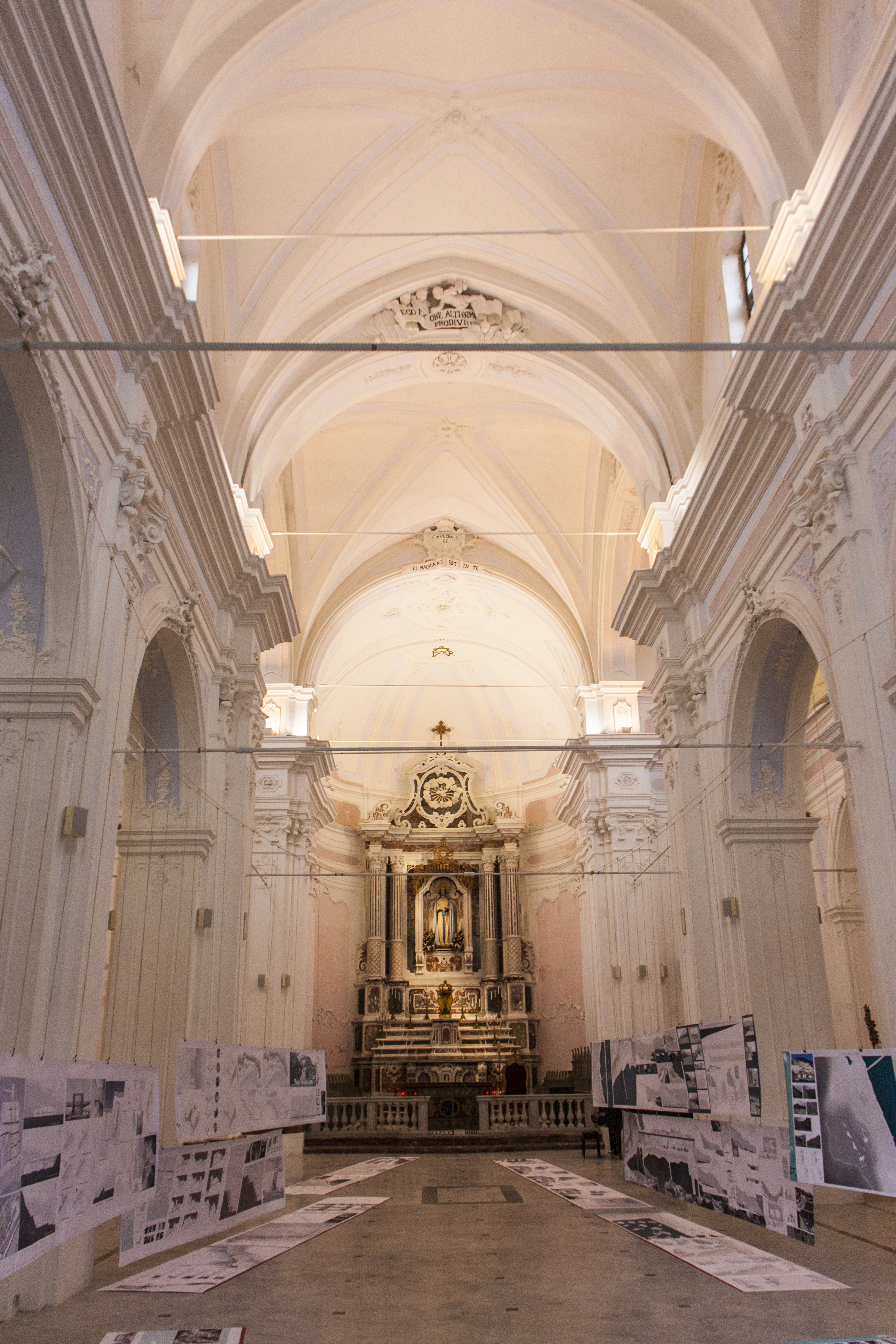 Chiesa dell'Immacolata (Lipari) - Interior